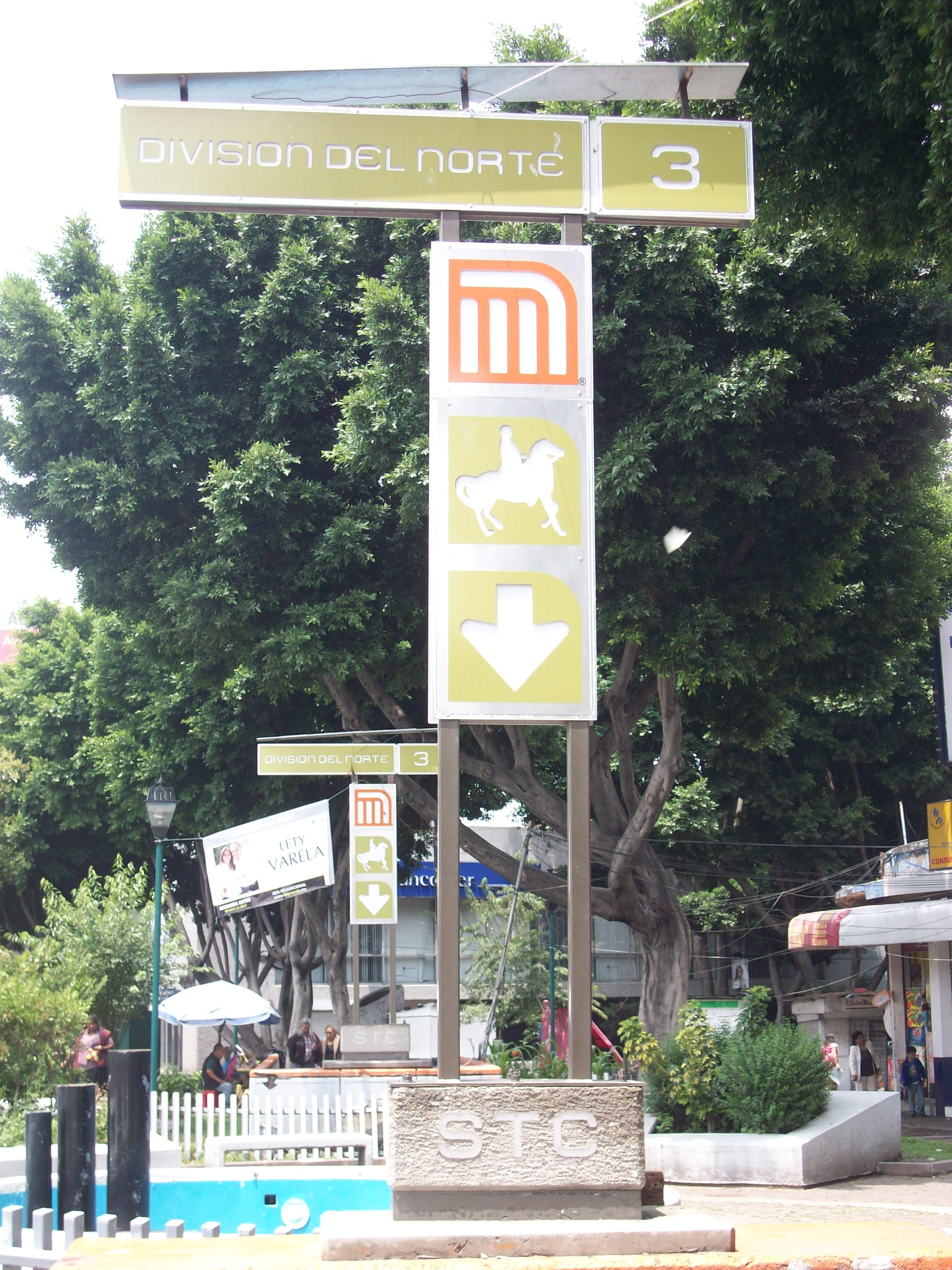 Estela de la estacion Division del Norte